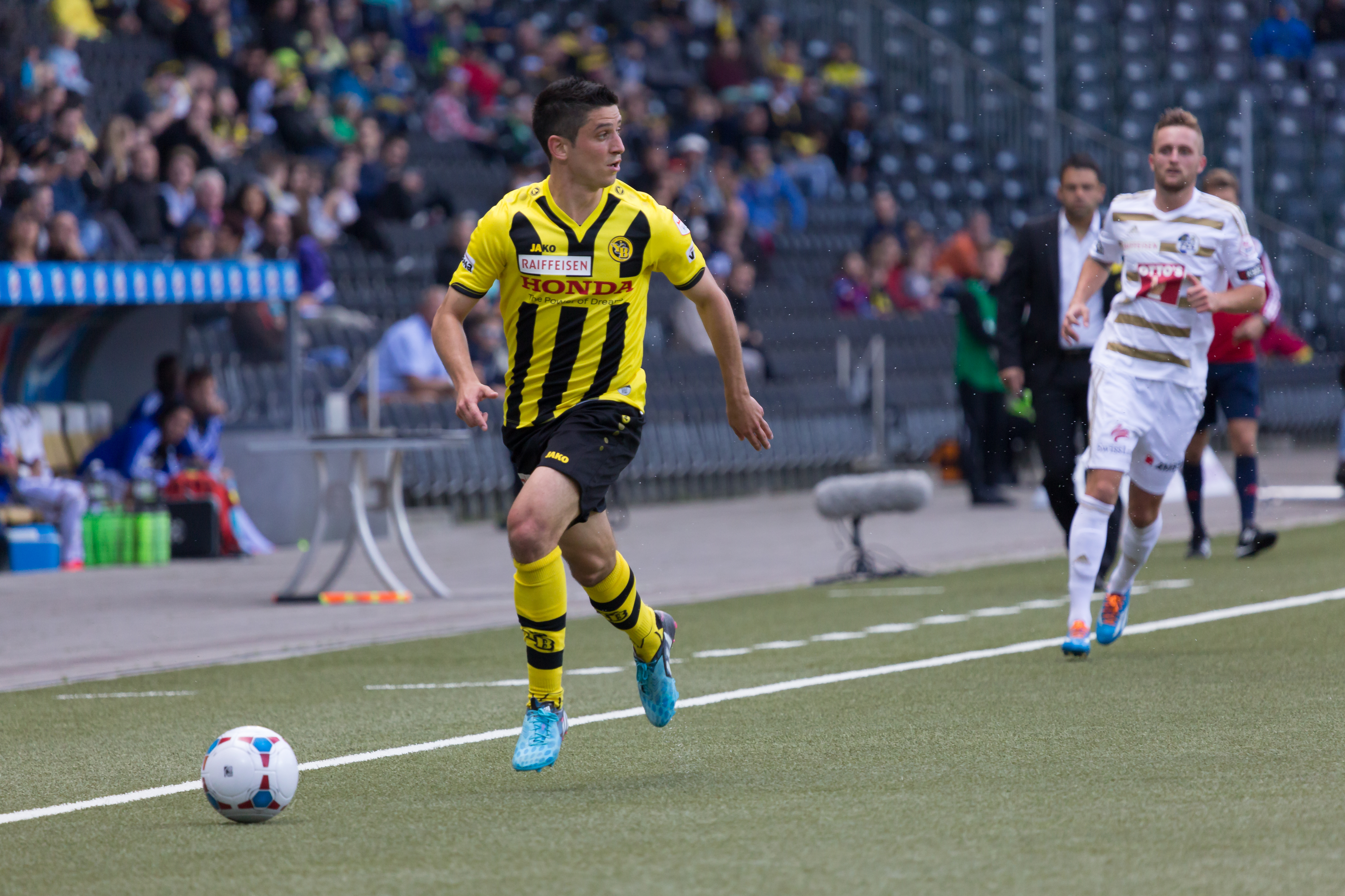 Moreno Costanzo beim Spiel des BSC Young Boys gegen den FC Luzern; im Hintergrund Jakob Jantscher und Uli Forte